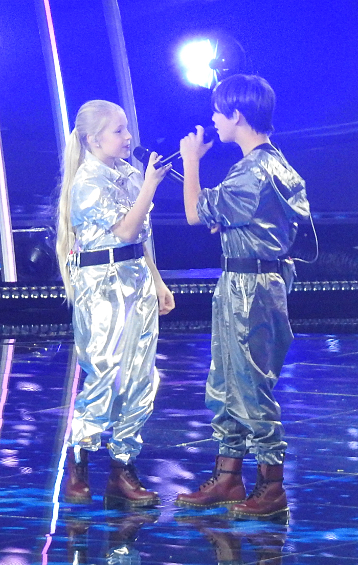 Rosyjscy piosenkarze Tatjana Meżenciewa i Denbieriel Oorżak podczas prób do występu w finale Konkursu Piosenki Eurowizji dla Dzieci 2019.